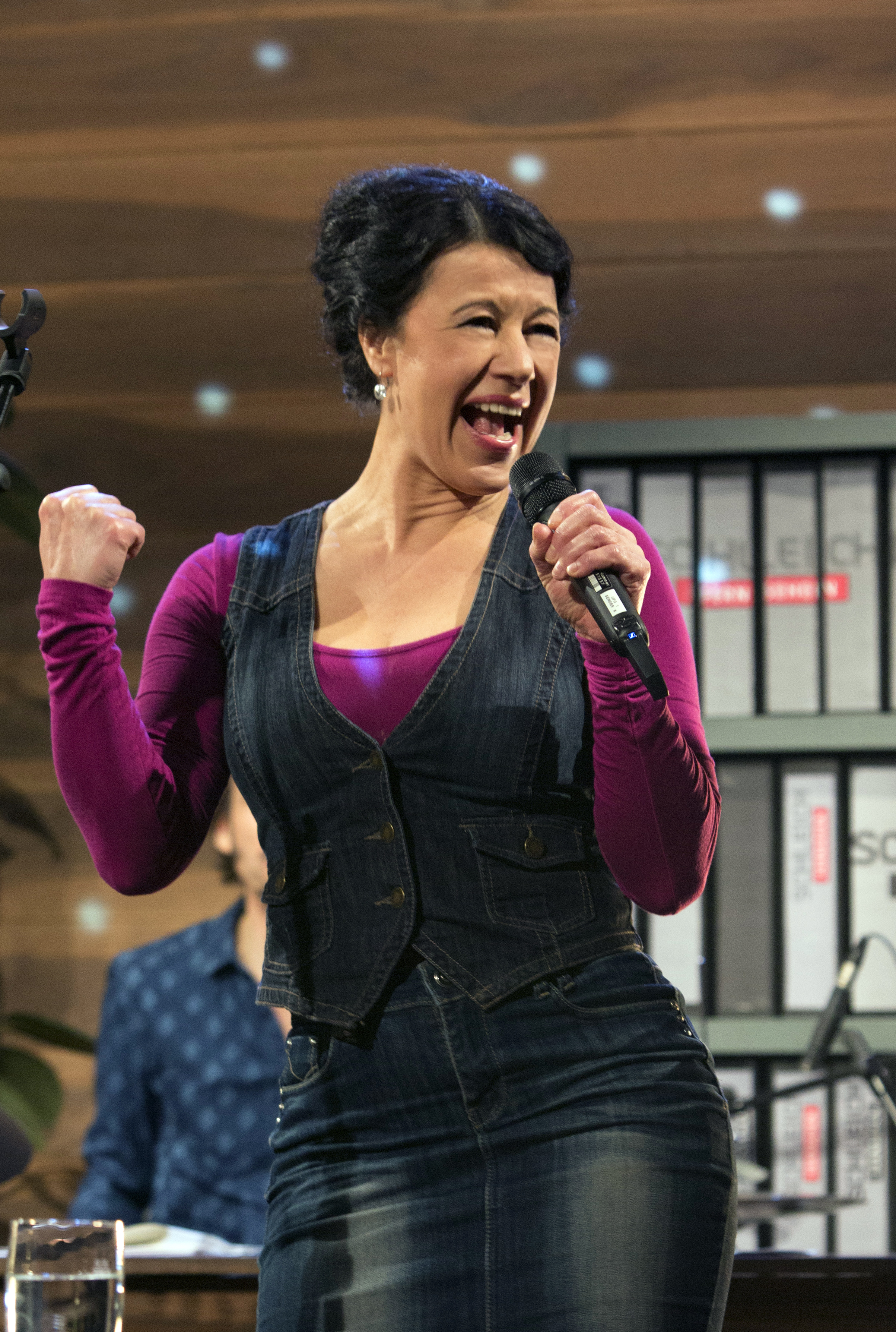 Conny Kreitmeier live